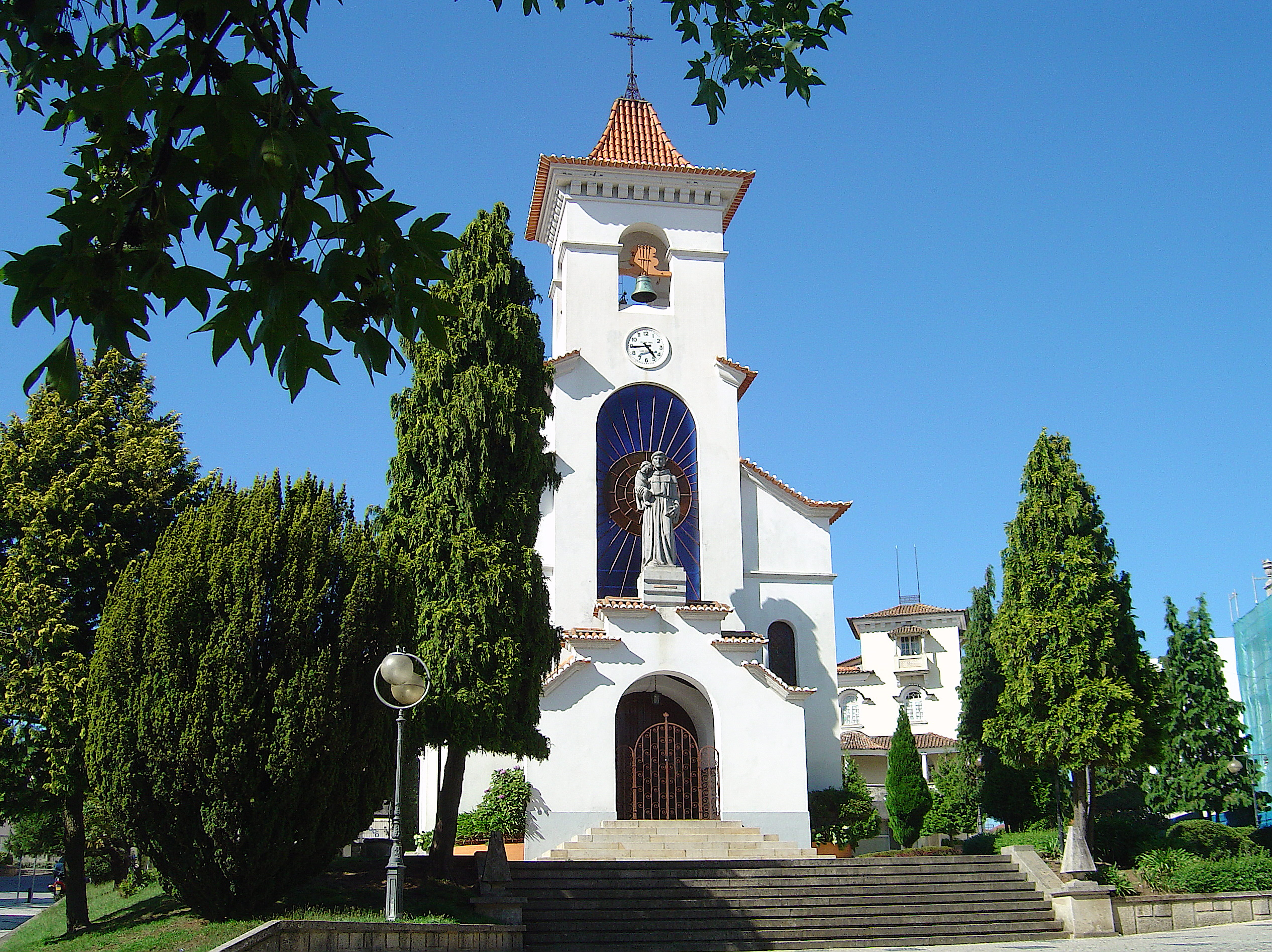 Capela de S. João - S. João da Madeira Fotografia de Vitor Oliveira, integrada na colecção com o endereço